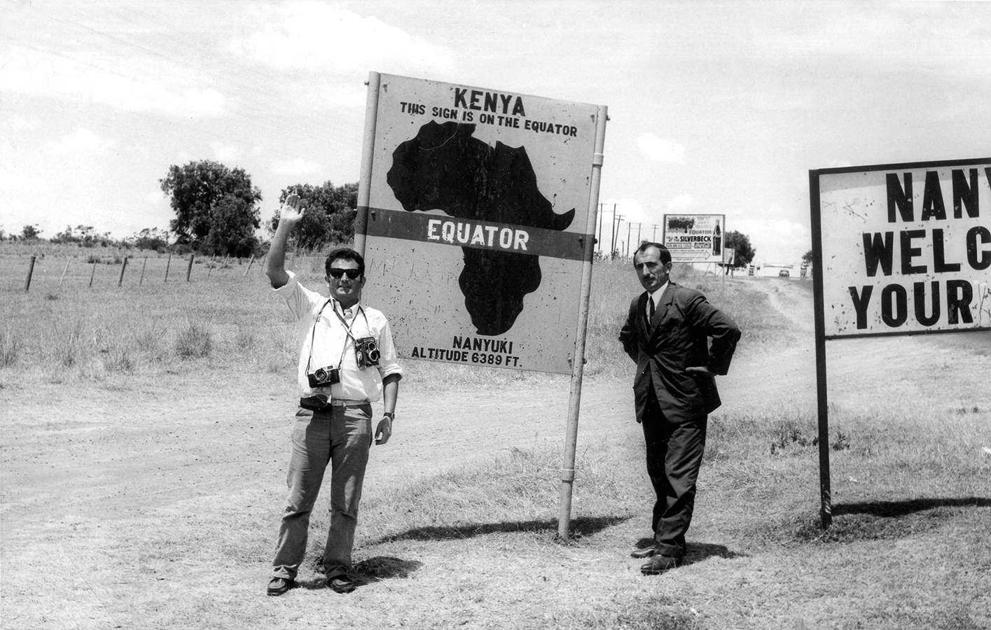 Srpski (latinica): Mirko Lovrić i Miloš Rašeta, fotografi